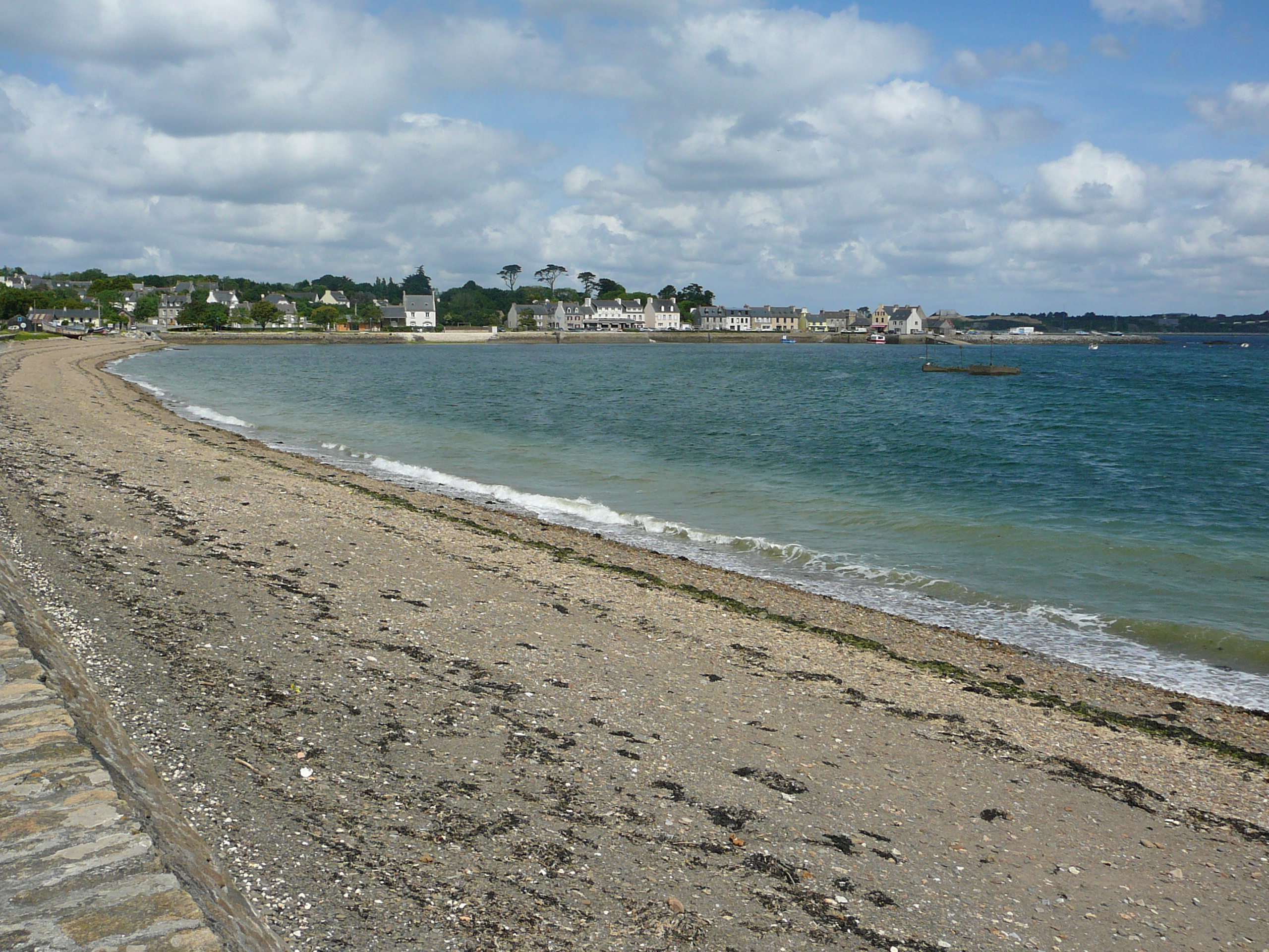 Presqu'île de Crozon : le port du Fret, vue générale